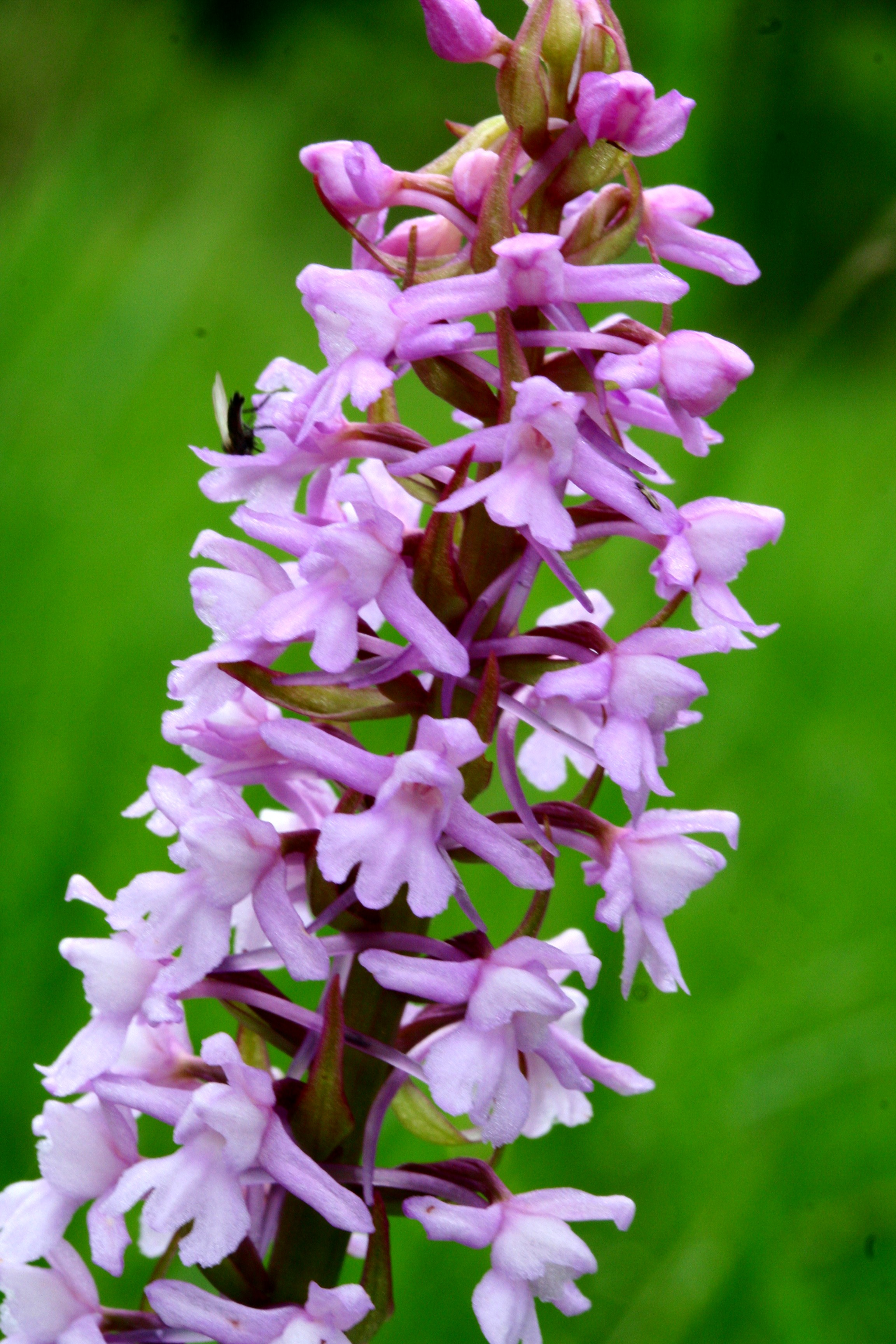 Manina rosea - Località: Val Piana, Limana (BL), 850 m s.l.m.